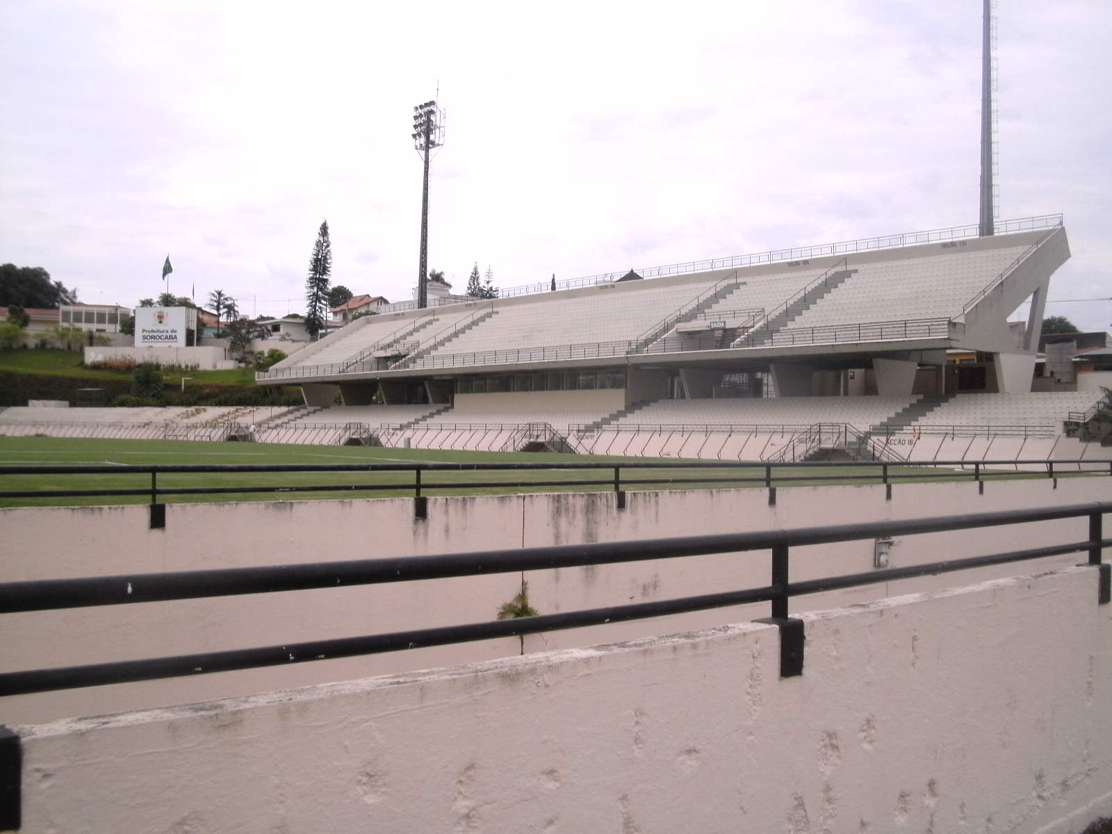 O Centro de Integração Comunitário Walter Ribeiro mais conhecido como CIC ou Estádio Municipal Walter Ribeiro localiza-se na cidade de Sorocaba e recebe jogos do Esporte Clube São Bento e do Clube Atlético Sorocaba. Tem capacidade atual de 13.722 torcedores. Foi inaugurado em 14 de outubro de 1978 para aposentar o estádio "Estádio Humberto Reale".